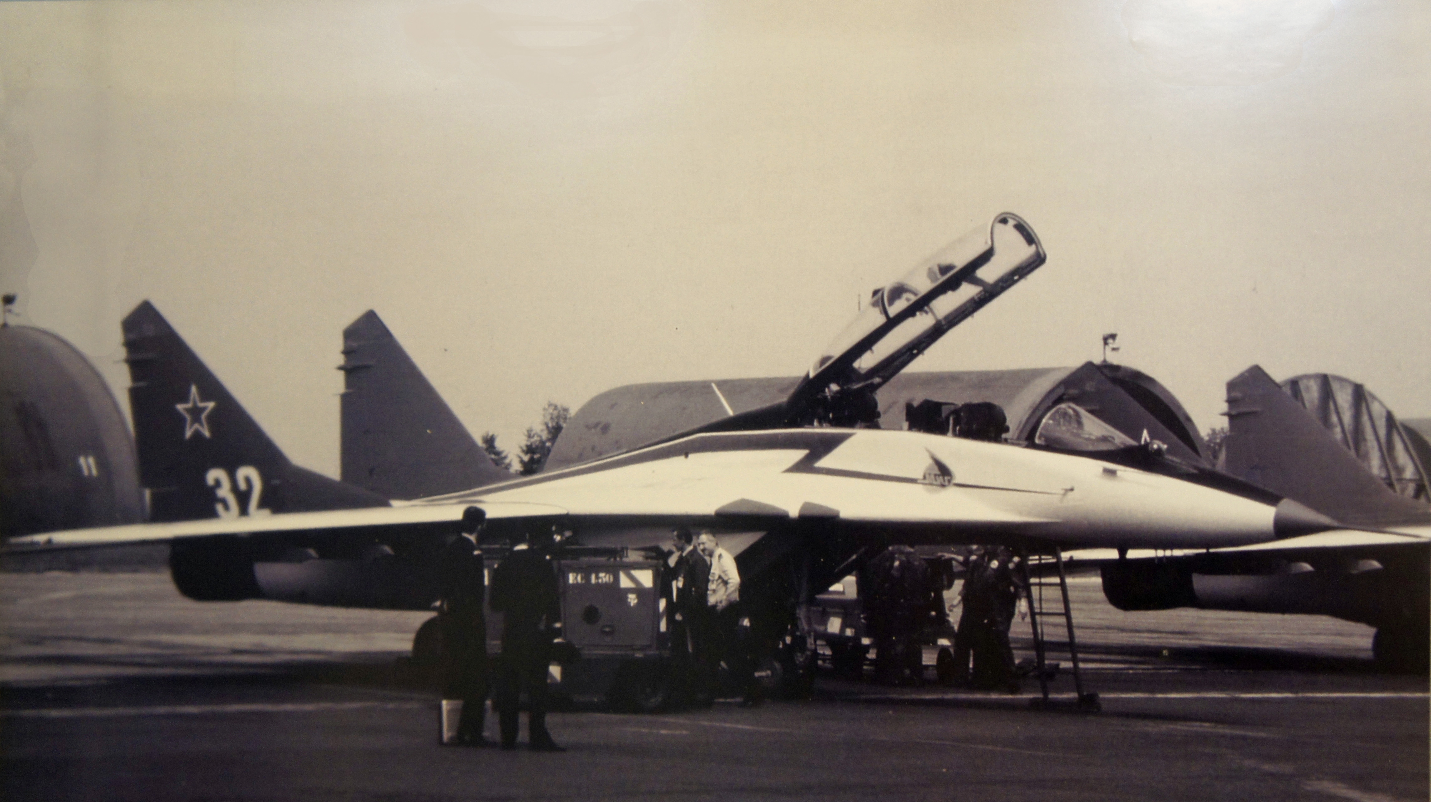 Echange dans le cadre de l'entente autour du bataillon Normandie-Niémen, sur la Base Aérienne 112 (BA 112), un avion soviétique MiG-29 en 1991.